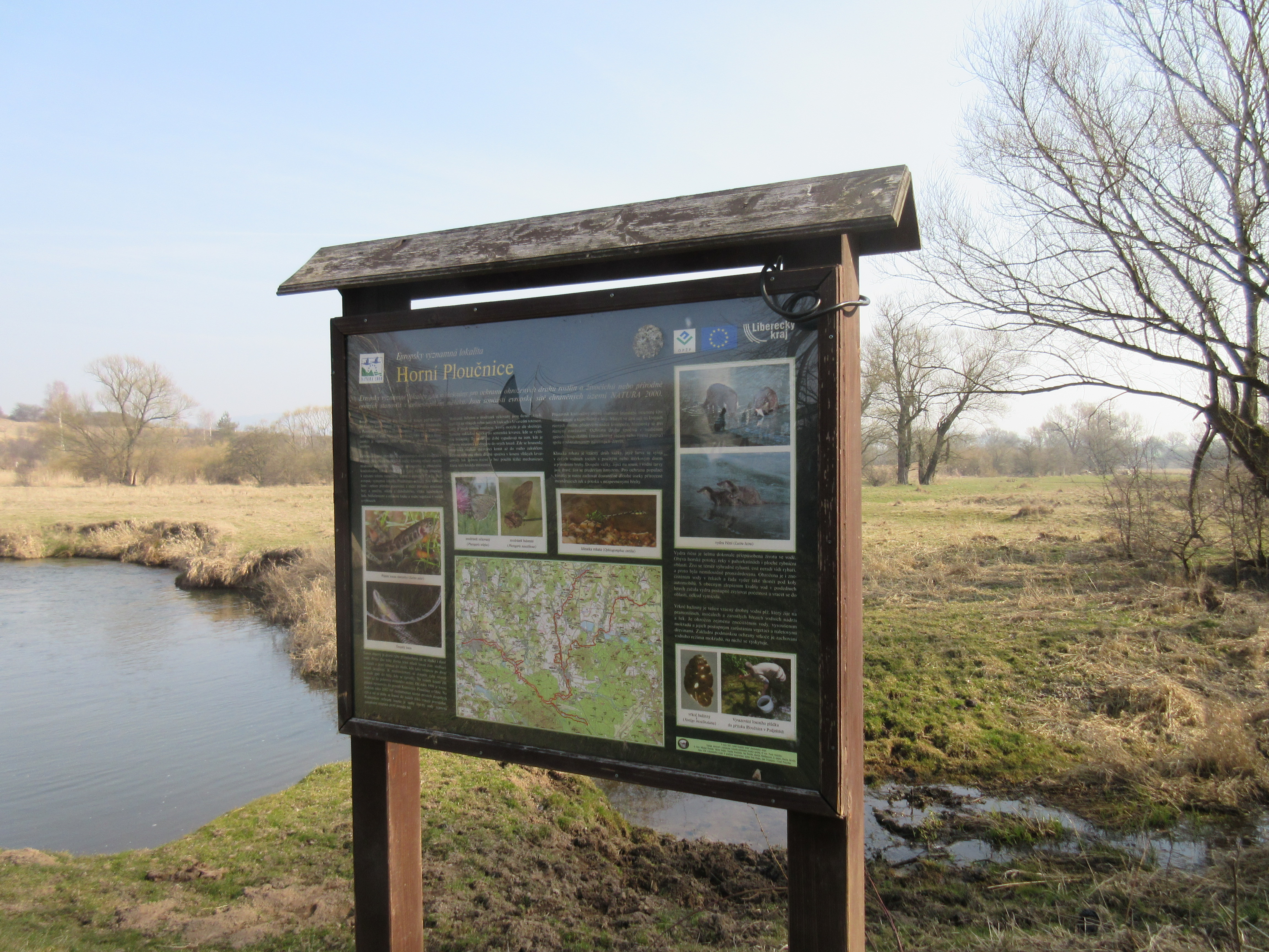 Infotabule Evropsky významné lokality Horní Ploučnice u Žizníkova